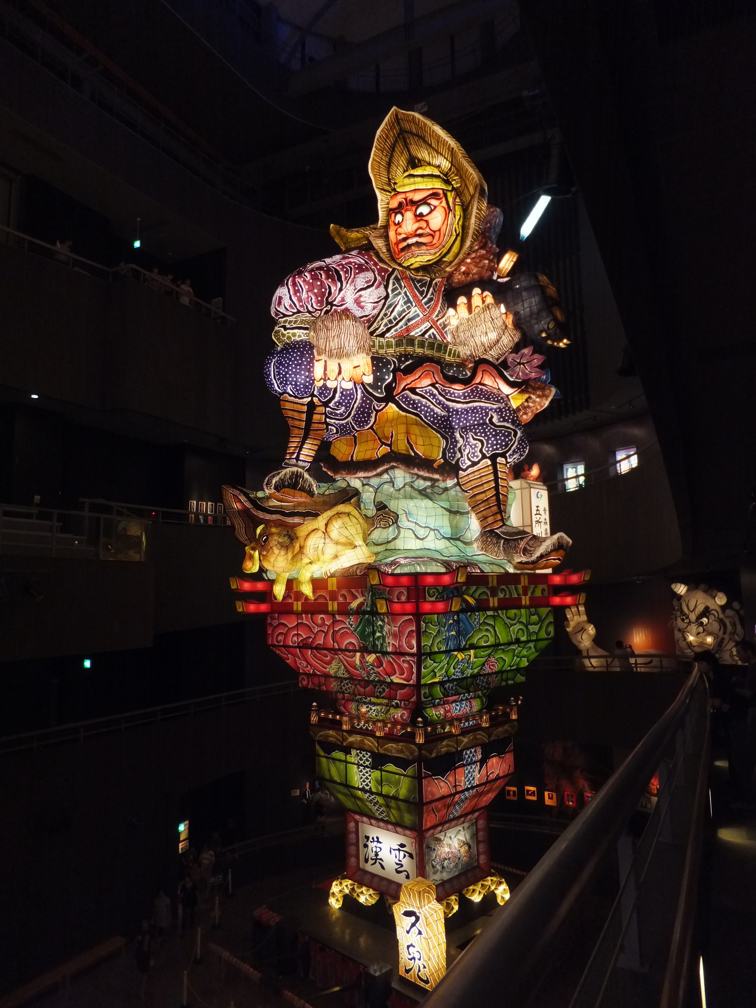 五所川原立佞武多、2010年作品『又鬼』（青森県五所川原市、立佞武多の館にて）